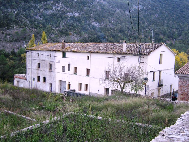 Edifici de la Numància al veïnat de Can Bou, municipi d'Orpí